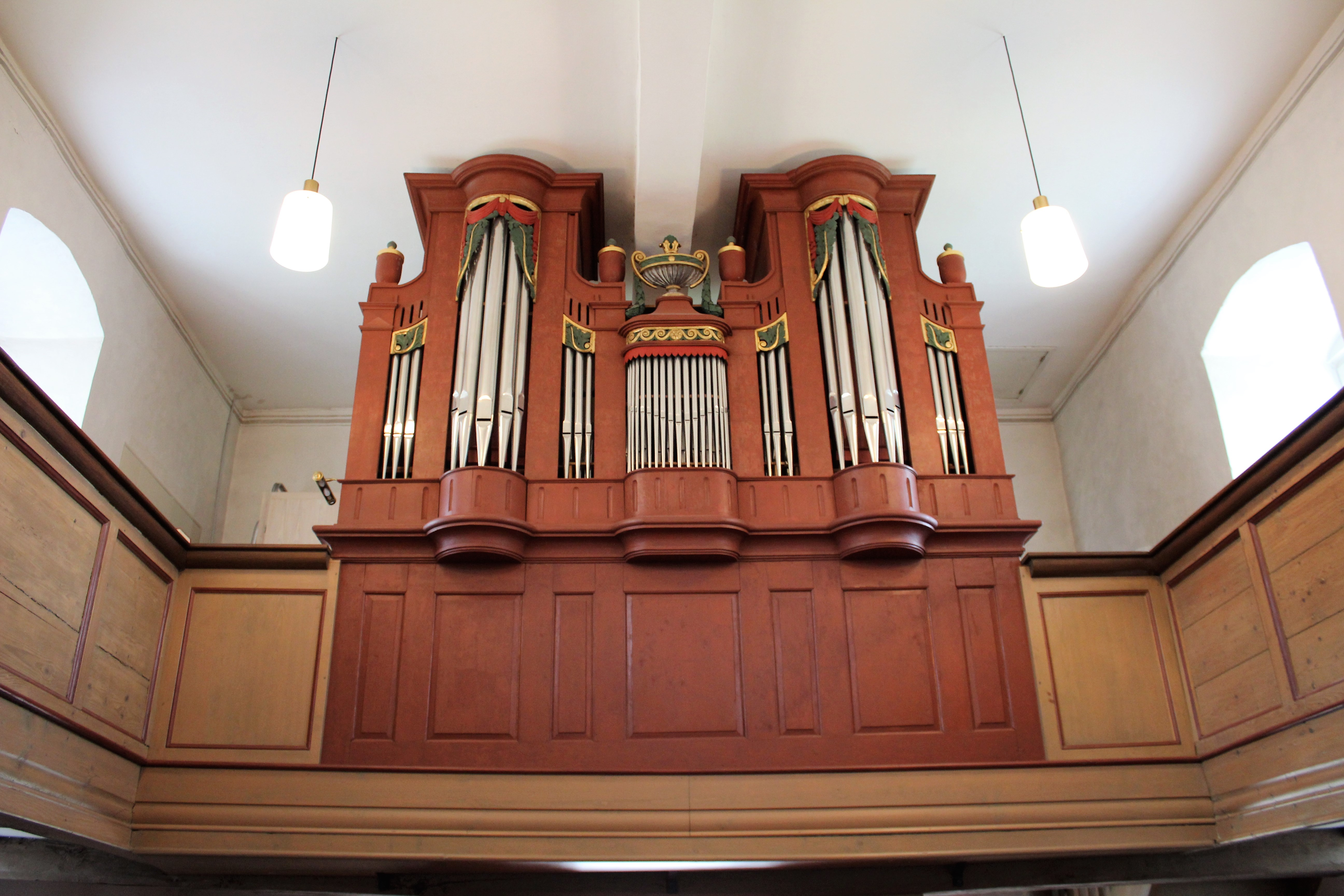 Evangelische Kirche Daubhausen, Lahn-Dill-Kreis, Hessen, Deutschland